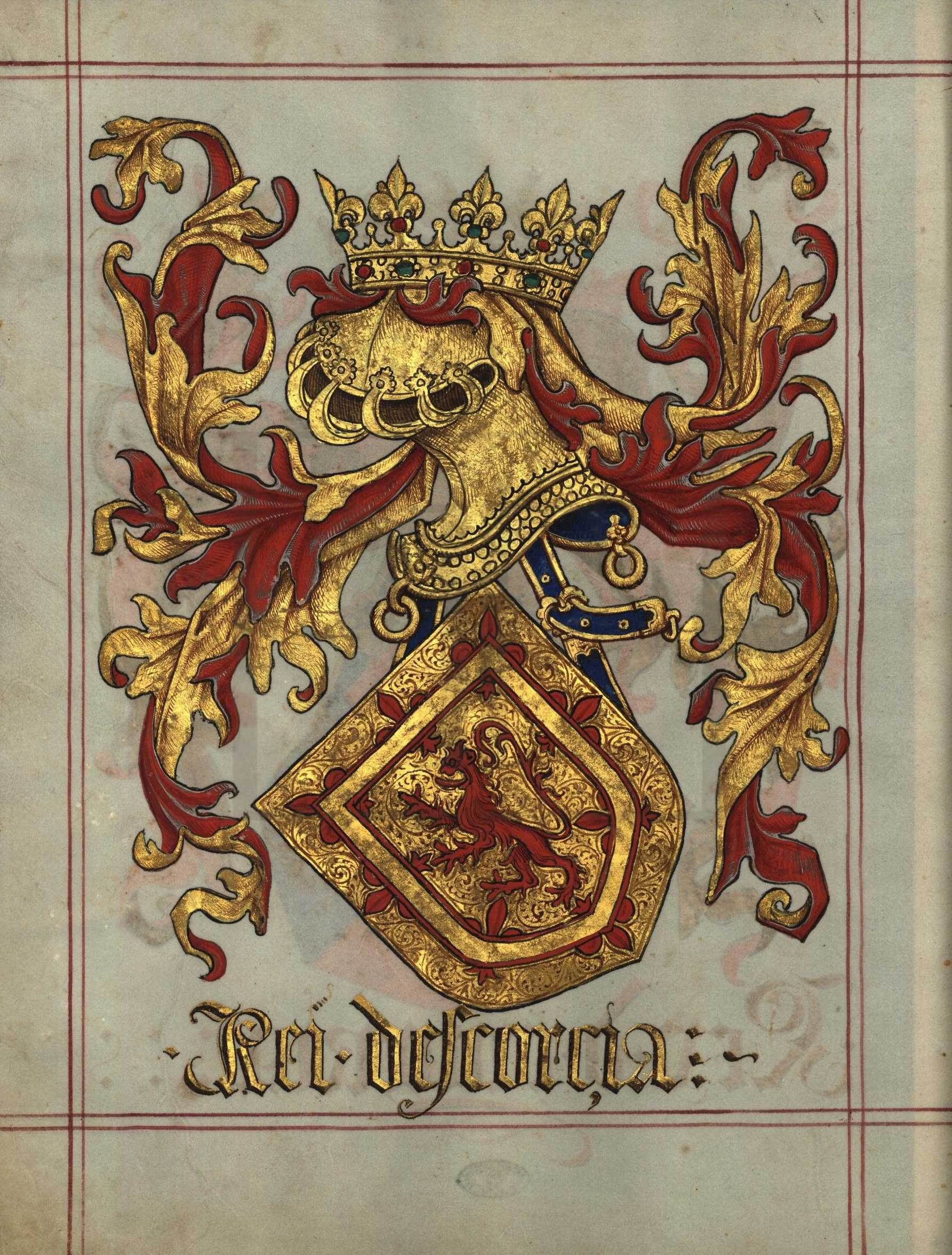 Livro do Armeiro-Mor, Rei da Escócia (fl 14v)